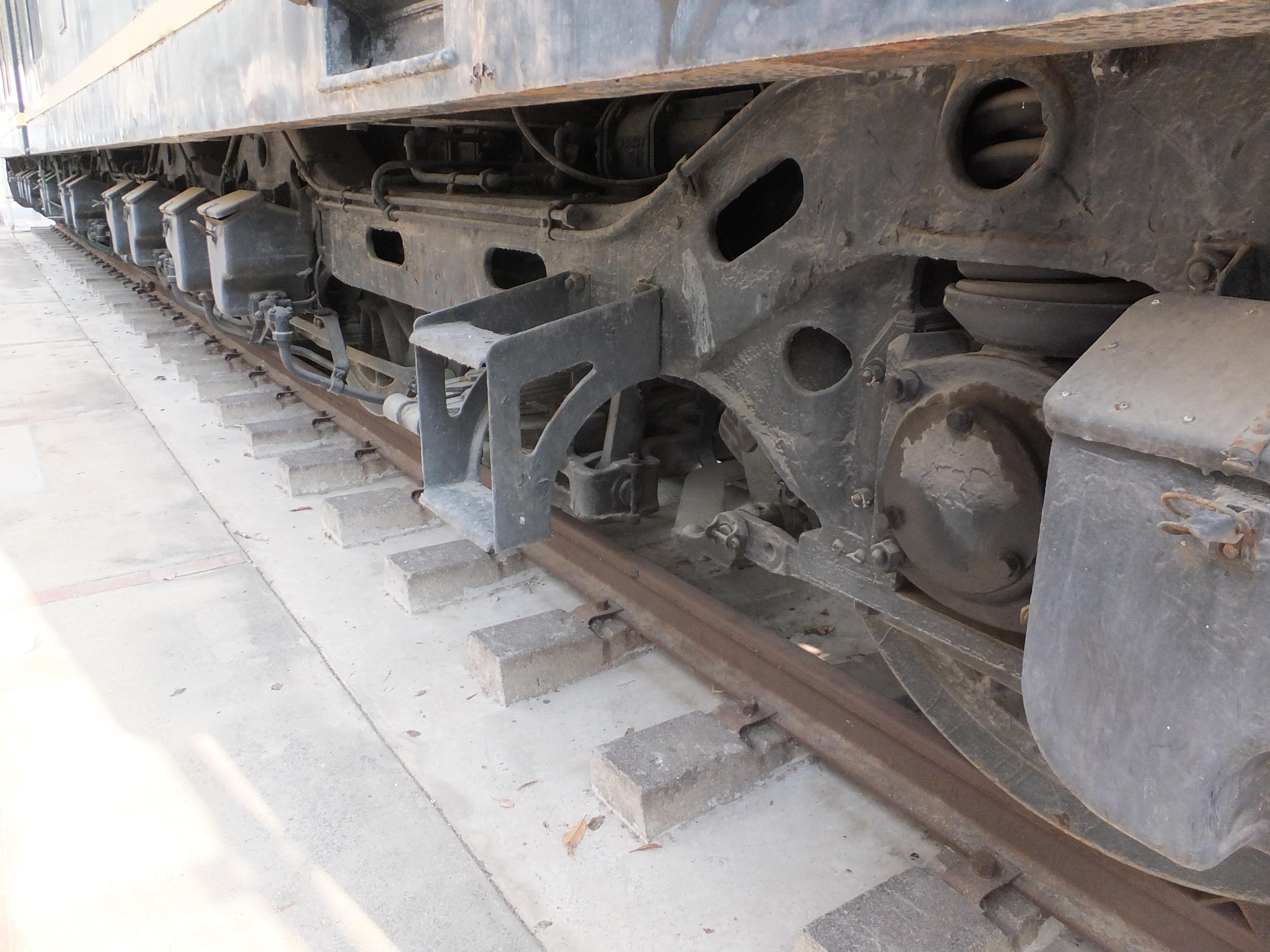 JNR EH10 足回り (許可を得て撮影)